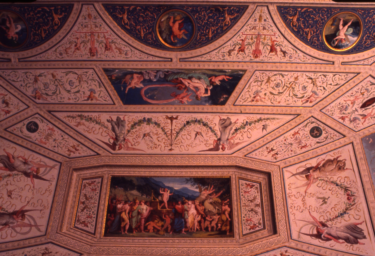 Servizio fotografico : Faenza, 1979 / Paolo Monti. - Foglio: 1, Fotogrammi complessivi: 1/20 : Diapositiva, sviluppo cromogeno/ pellicola ; 35 mm. - ((Le diapositive nn. 01-08 e 10-20 costituiscono altre serie. - Confronti con negativi b/n (gelatina bromuro d'argento/ pellicola - 35mm). - Occasione: Documentazione Musei e Palazzi di Faenza per mostra "L'età Neoclassica a Faenza" [Felice Giani] su ordinazione del Professor Andrea Emiliani. - Fonte: Rubrica di Paolo Monti: Diapositive 24x36mm (1948-1982), presso Archivio Paolo Monti. Rubrica con elenco soggetti e numeri di inventario (da 1 a 1000) corrispondenti ai fogli a tasche in pvc in cui sono contenute le diapositive. - Fonte: Fattura di Paolo Monti: IV. Commesse/ Fattura n. 31/ Fotografie Palazzo Milzetti per mostra L'età Neoclassica a Faenza (1979/10/08), presso Archivio Paolo Monti. - Fonte: Fattura di Paolo Monti: IV. Commesse/ Fattura n. 22/ Fotografie Musei e Palazzi [e Cappelle del Duomo] di Faenza (1979/07/02), presso Archivio Paolo Monti. Riprese fotografiche palazzi, affreschi, sculture Museo Civico, Duomo, Palazzi e Chiese. - Fonte: Monografia di Biennale d'Arte Antica (10. ; 1979): L'età neoclassica a Faenza, 1780-1820: Faenza, Palazzo Milzetti, 9 settembre-26 novembre 1979, catalogo della mostra, Faenza 1979, a cura di Anna Ottani Cavina, in L'arte del Settecento in Emilia e in Romagna, Bologna, Alfa (1979). - Fonte: Fattura di Paolo Monti: IV. Commesse/ Fattura n. 34/ Fotografie interni e decorazioni Palazzo Milzetti in Faenza (1979/12/29), presso Archivio Paolo Monti